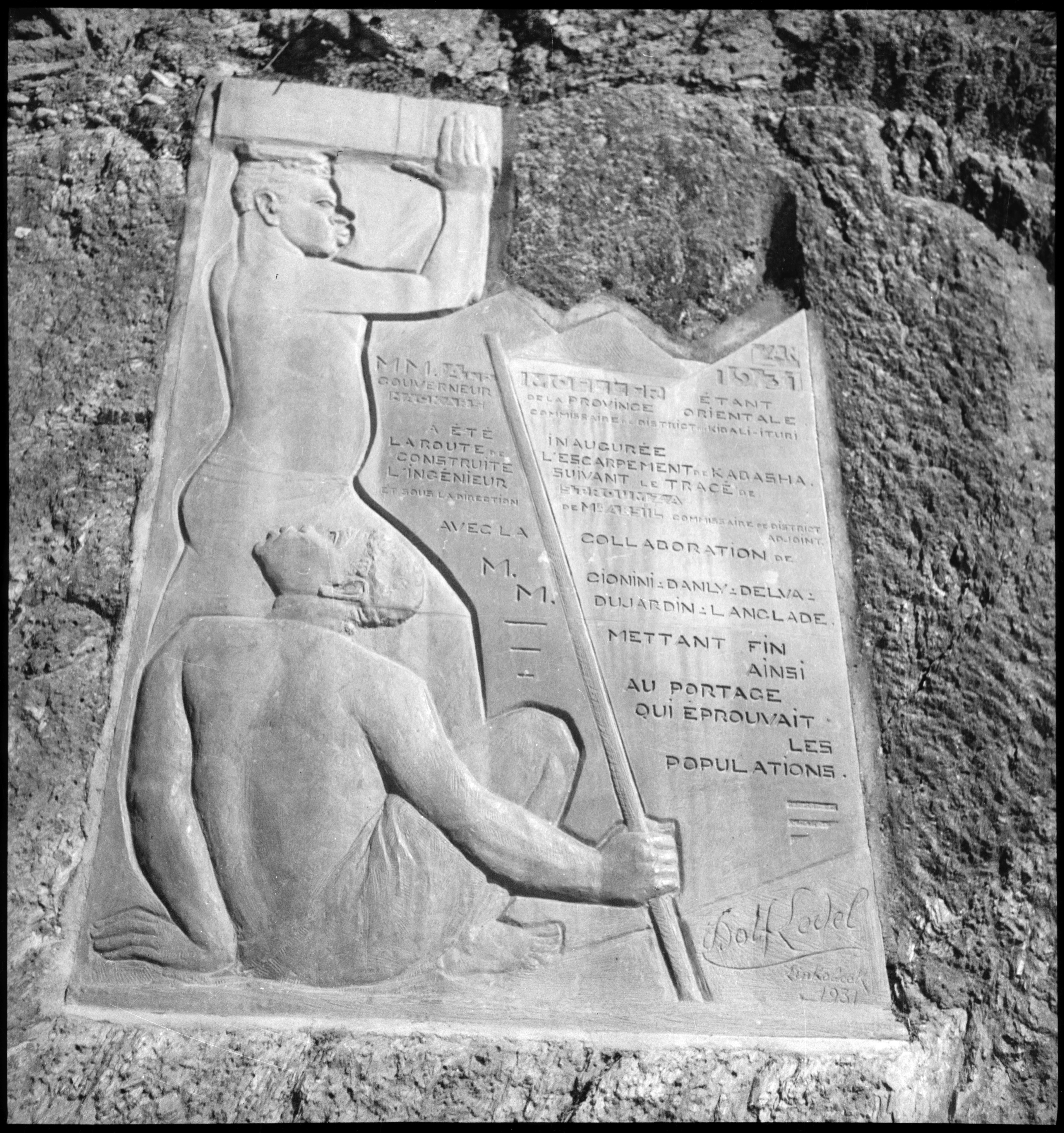 Belgisch-Kongo, Lubero: Gedenktafel; Gedenktafel errichtet 1931 durch den belgischen Bildhauer Dolf Ledel für die Ingenieure, welche die Strasse durch die Engschlucht von Kabasha gebaut haben